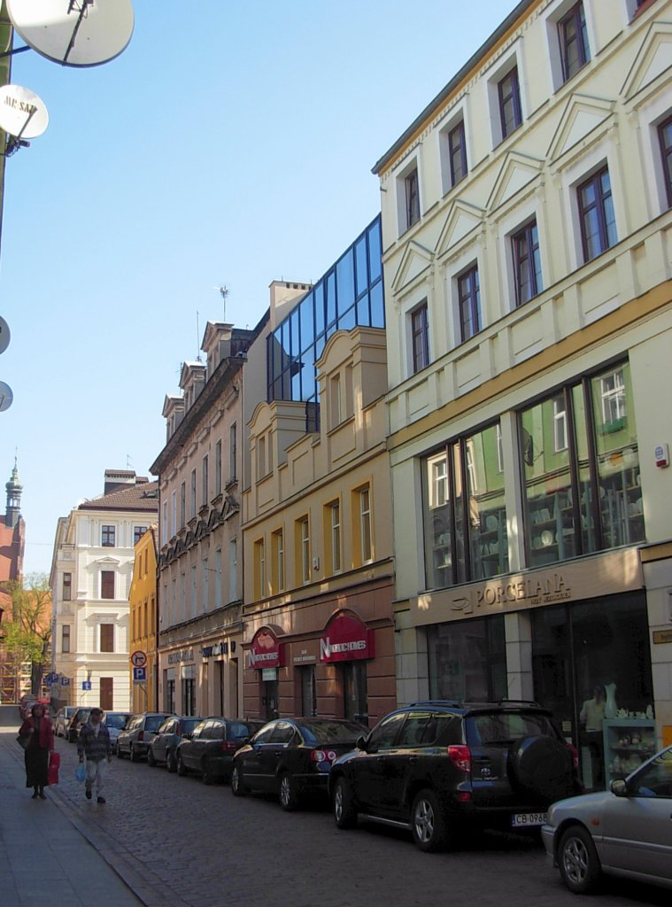 Ulica Jezuicka w Bydgoszczy